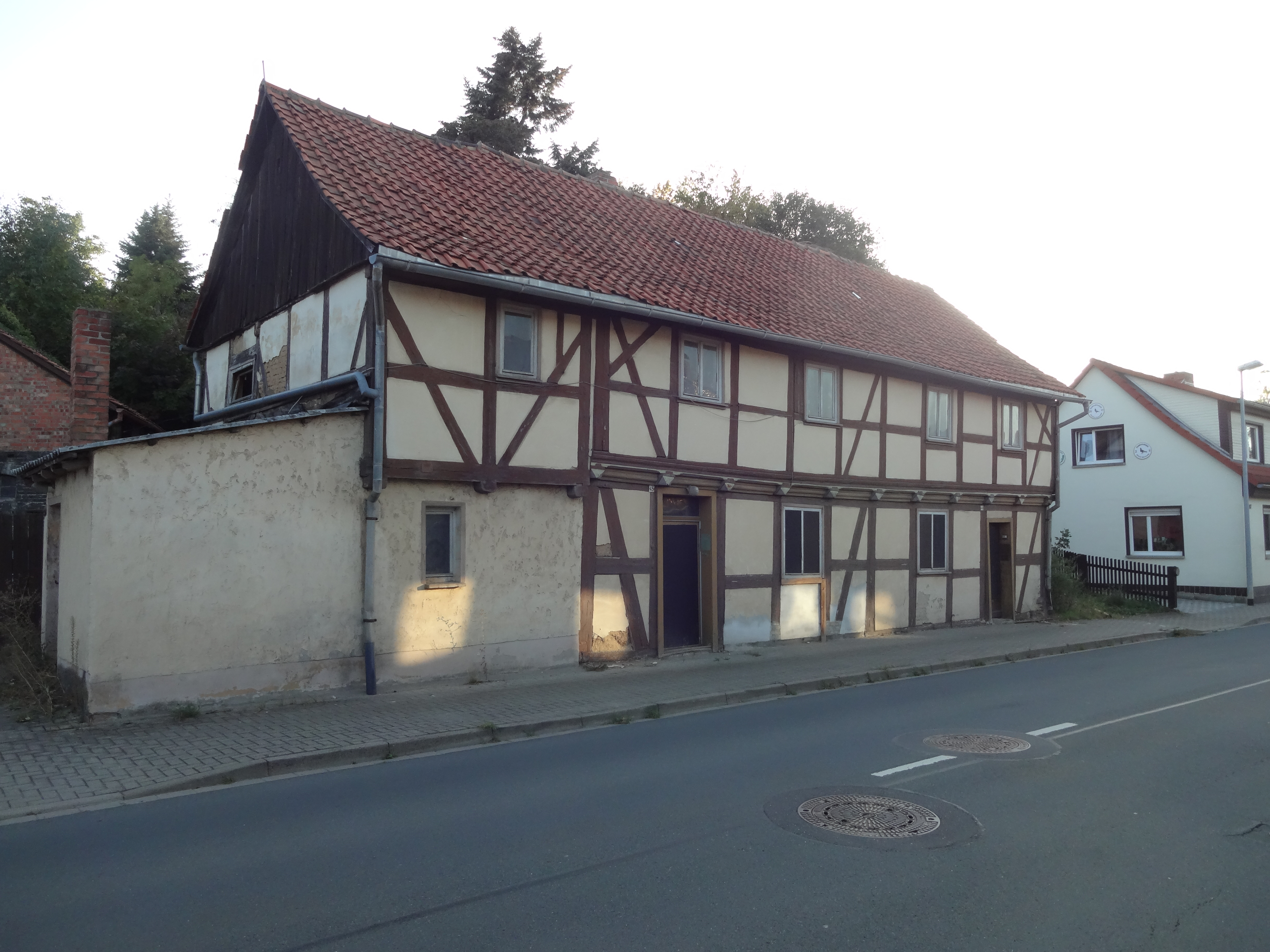 denkmalgeschütztes Wohnhaus in der Wilhelm-Pieck-Straße 45, 46 in Heimburg